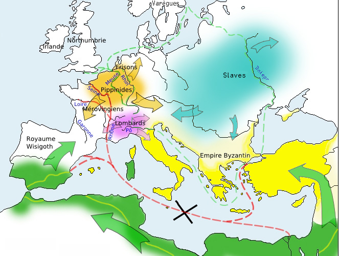 Carte des voies commerciales avant (en rouge) et après (en vert) l'expansion musulmane du VIIeme siècle (prennant le controle de la méditerranée occidentale et impact sur l'expansion des pippinides et des lombards au détriment des mérovingiens, des wisigoths et de l'empire byzantin.